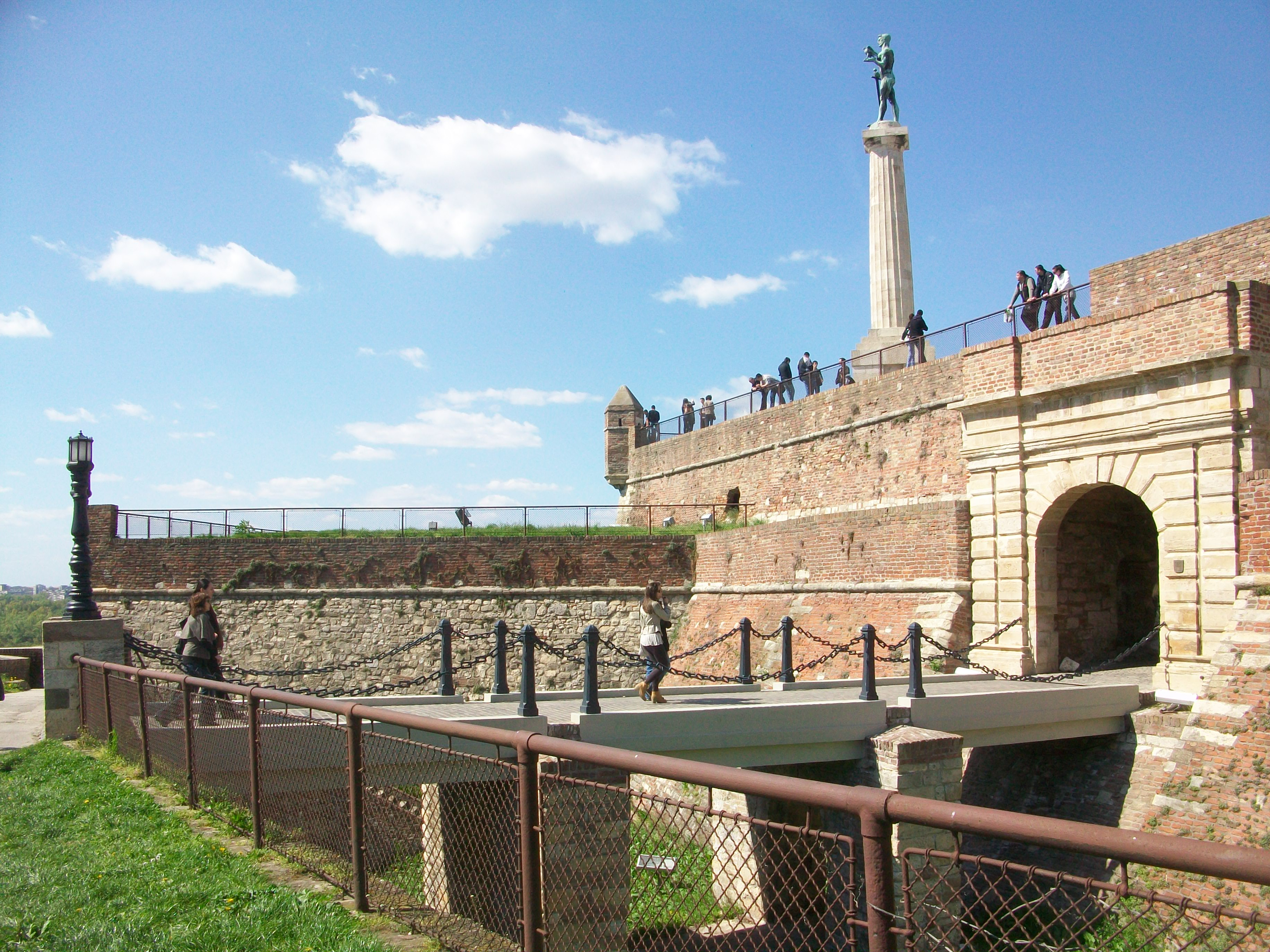 Sırbistan'ın başkenti Belgrad'daki Kalemegdan'dan bir görüntü.